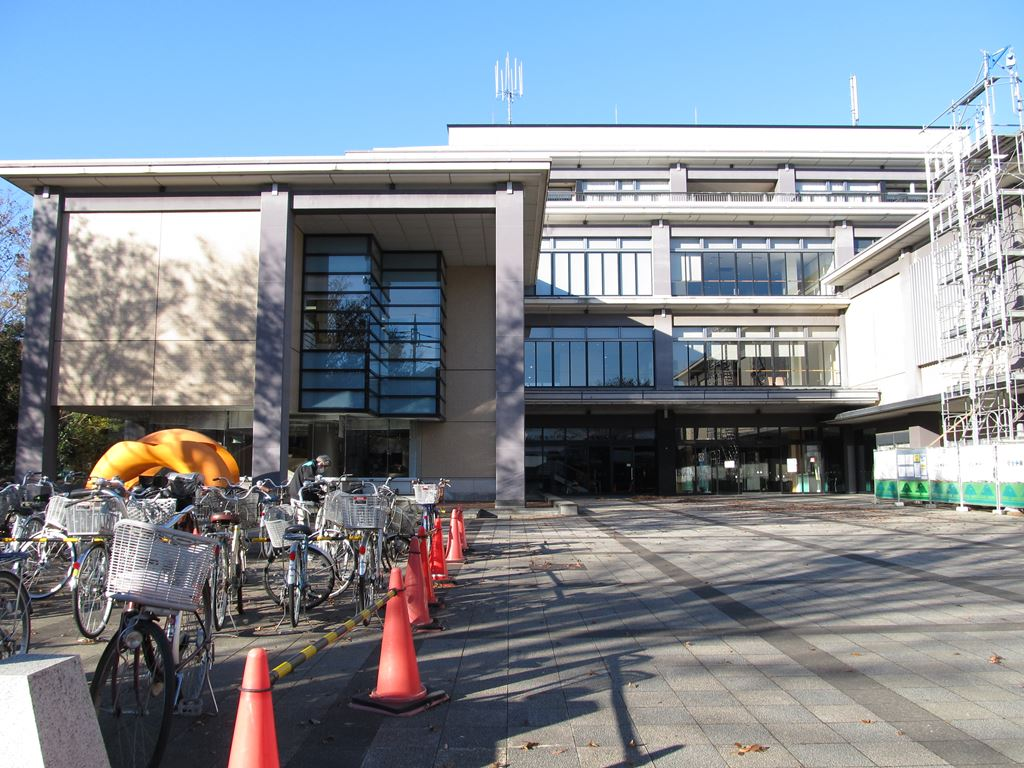 生涯学習センター。東京都府中市。Fuchu-city, Tokyo